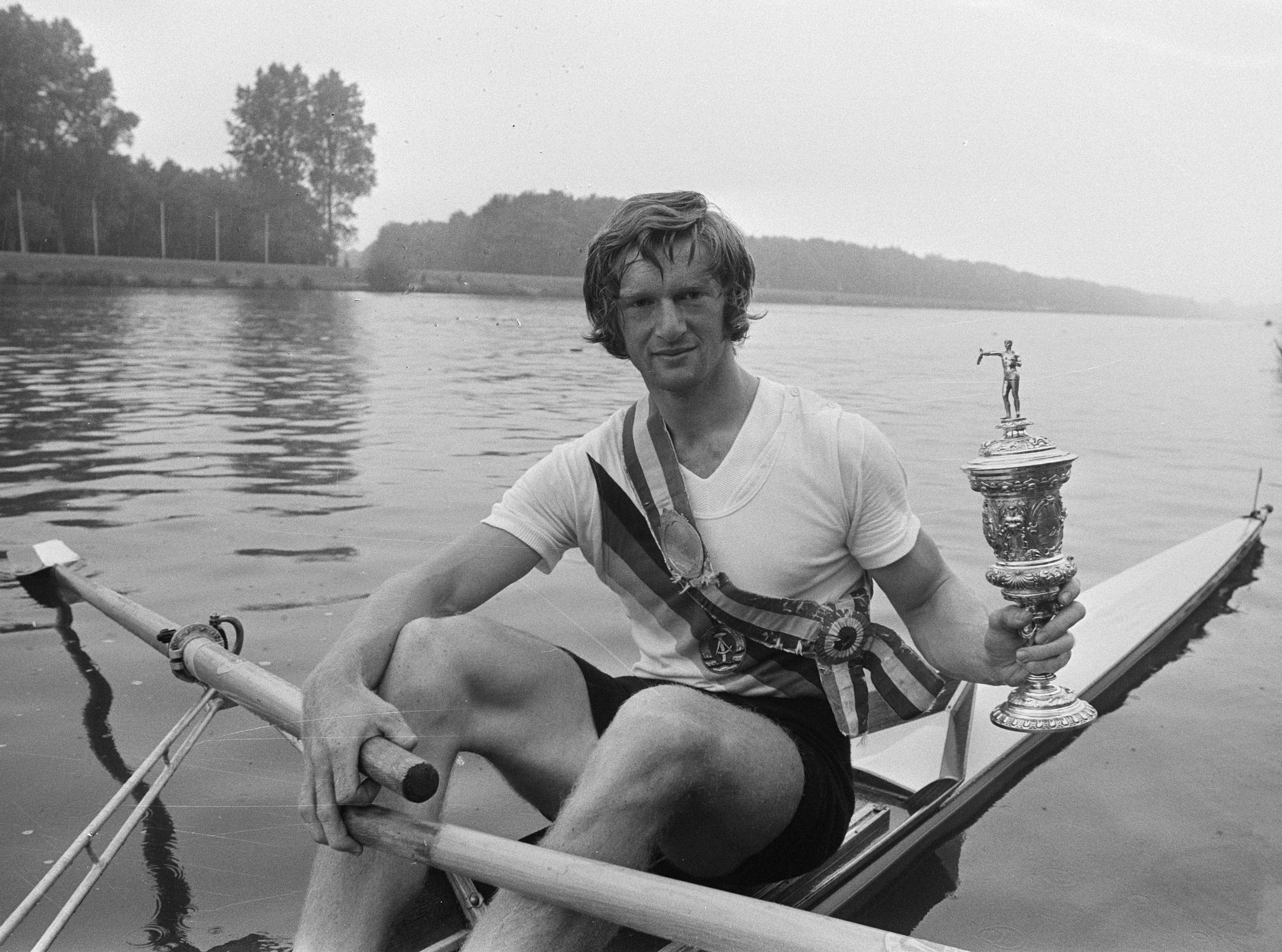 Internationale roeikampioenschappen en Holland Beker op Bosbaan in Amsterdam; winnaar Holland Beker , W. Honig (DDR))